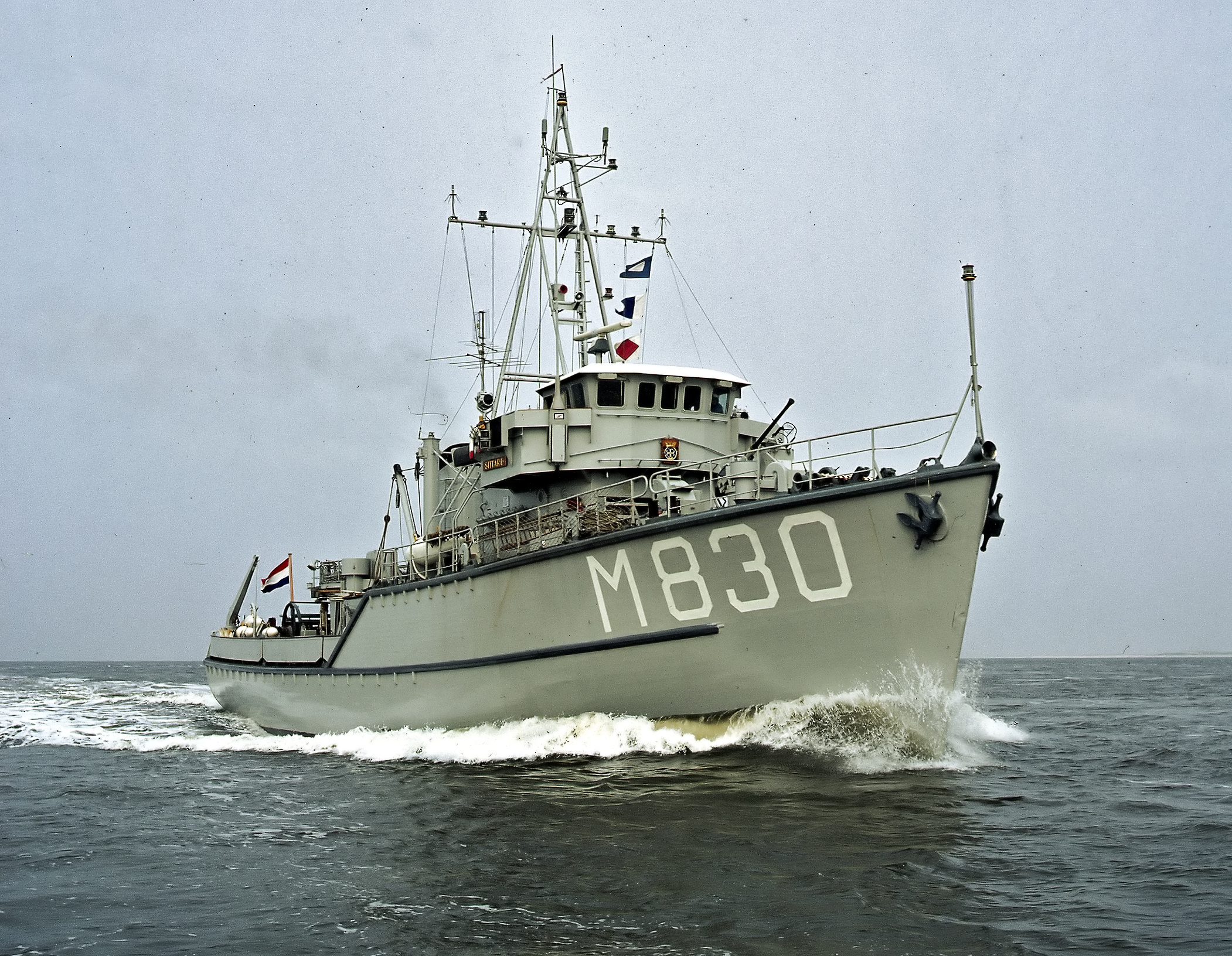 Foto van Hr. Ms. Sittard in de jaren '80.